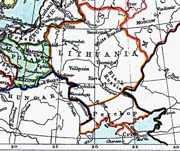 Karta, Litauen 1400